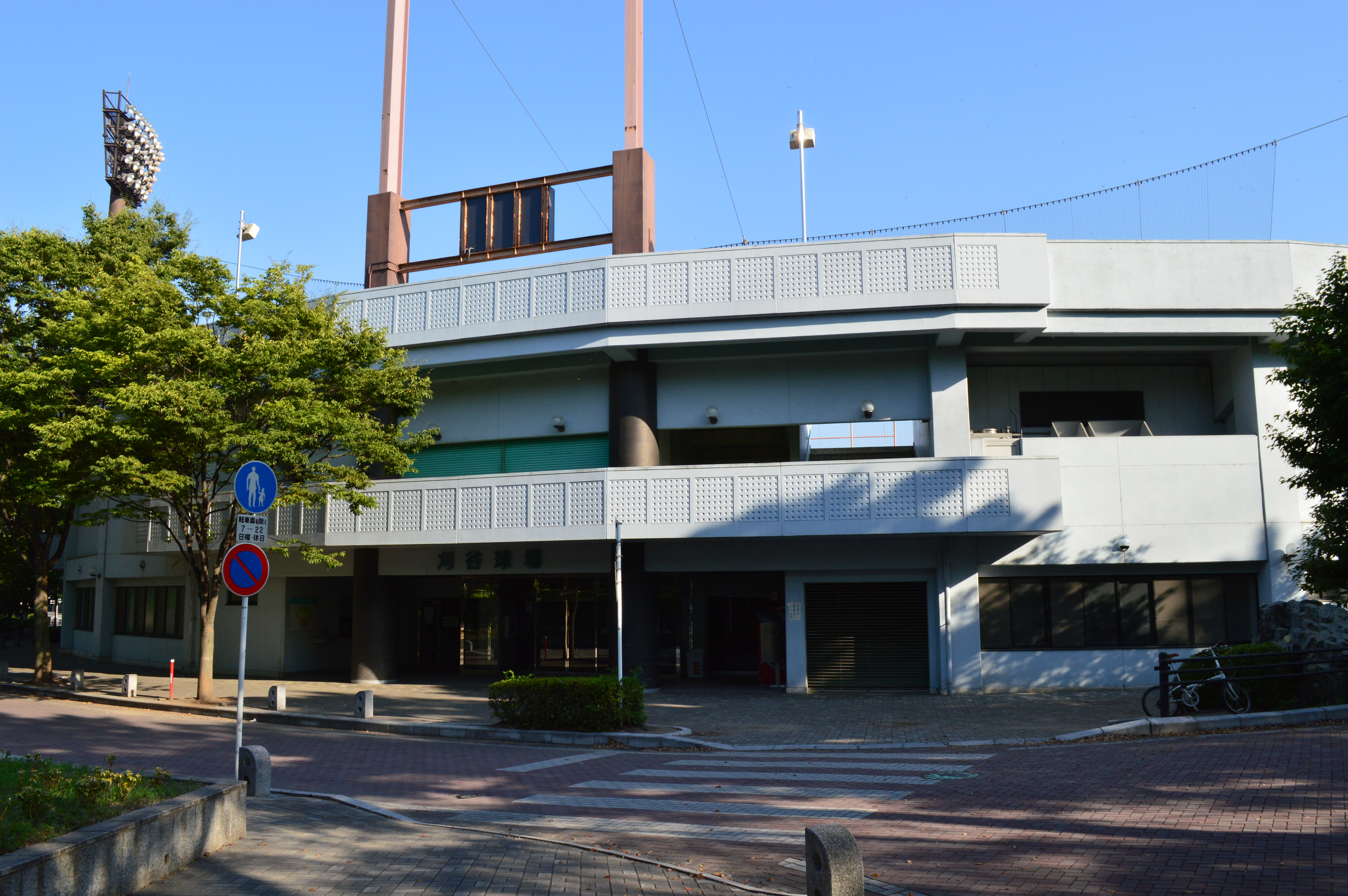 愛知県刈谷市城町にある刈谷球場